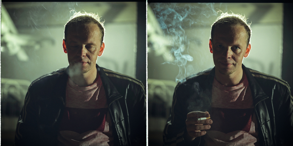 Hendrik Toompere juunior suvel 2007.